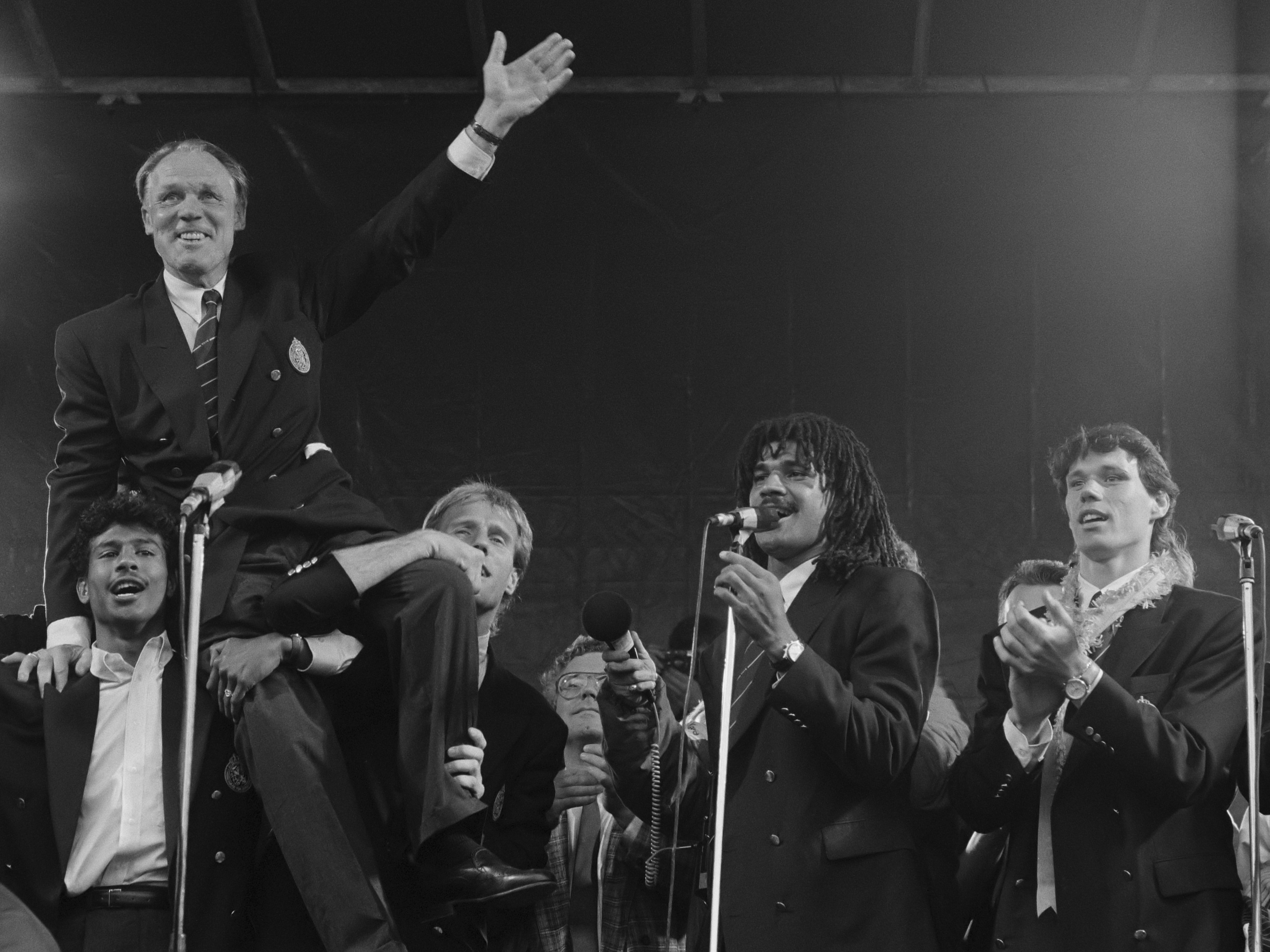 Nederlands elftal na Europees kampioenschap 1988 te Munchen in Amsterdam; Rinus Michels op de schouders podium Museumplein Gullit en Van Basten 26 juni 1988